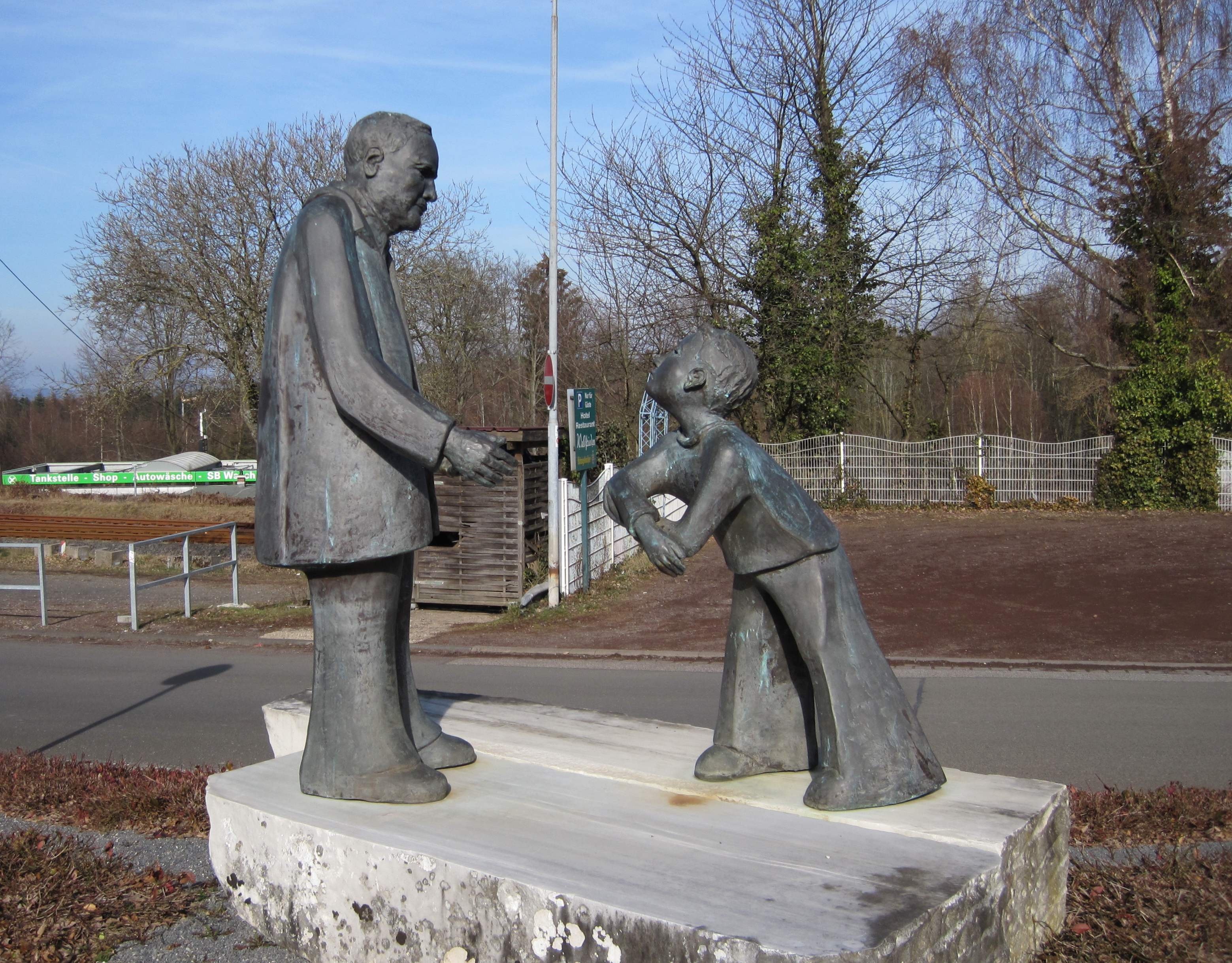 Skulptur "Der Knochenflicker - Herr Peter Pies und ein junger Patient" der Künstlerin Jutta Reiss aus dem Jahr 2008 anlässlich des 100-jährigen Bestehens der Hunsrückbahn. Standort vor dem Bahnhof Emmelshausen, Rhein-Hunsrück-Kreis.